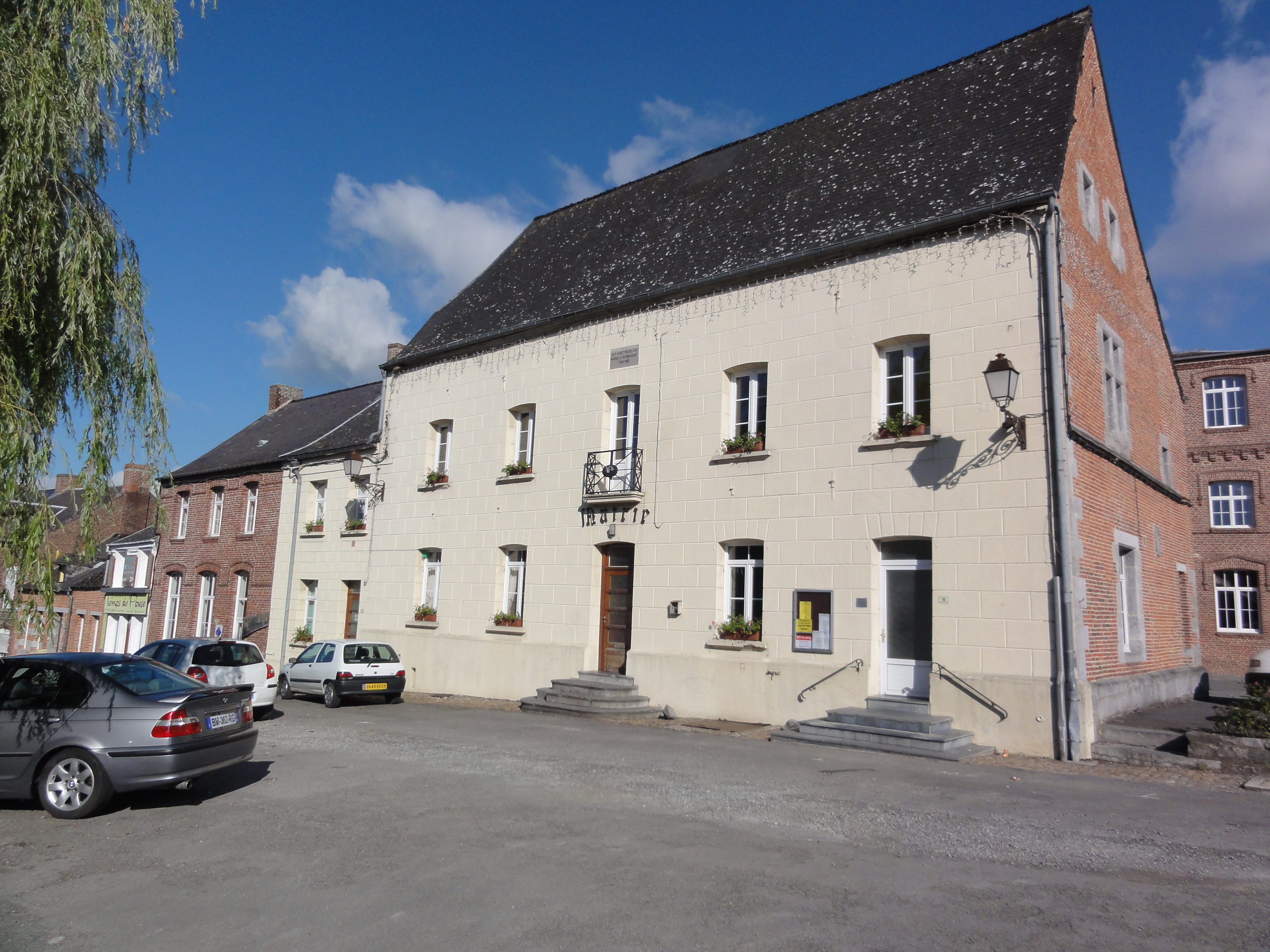 (Nord, Fr) mairie